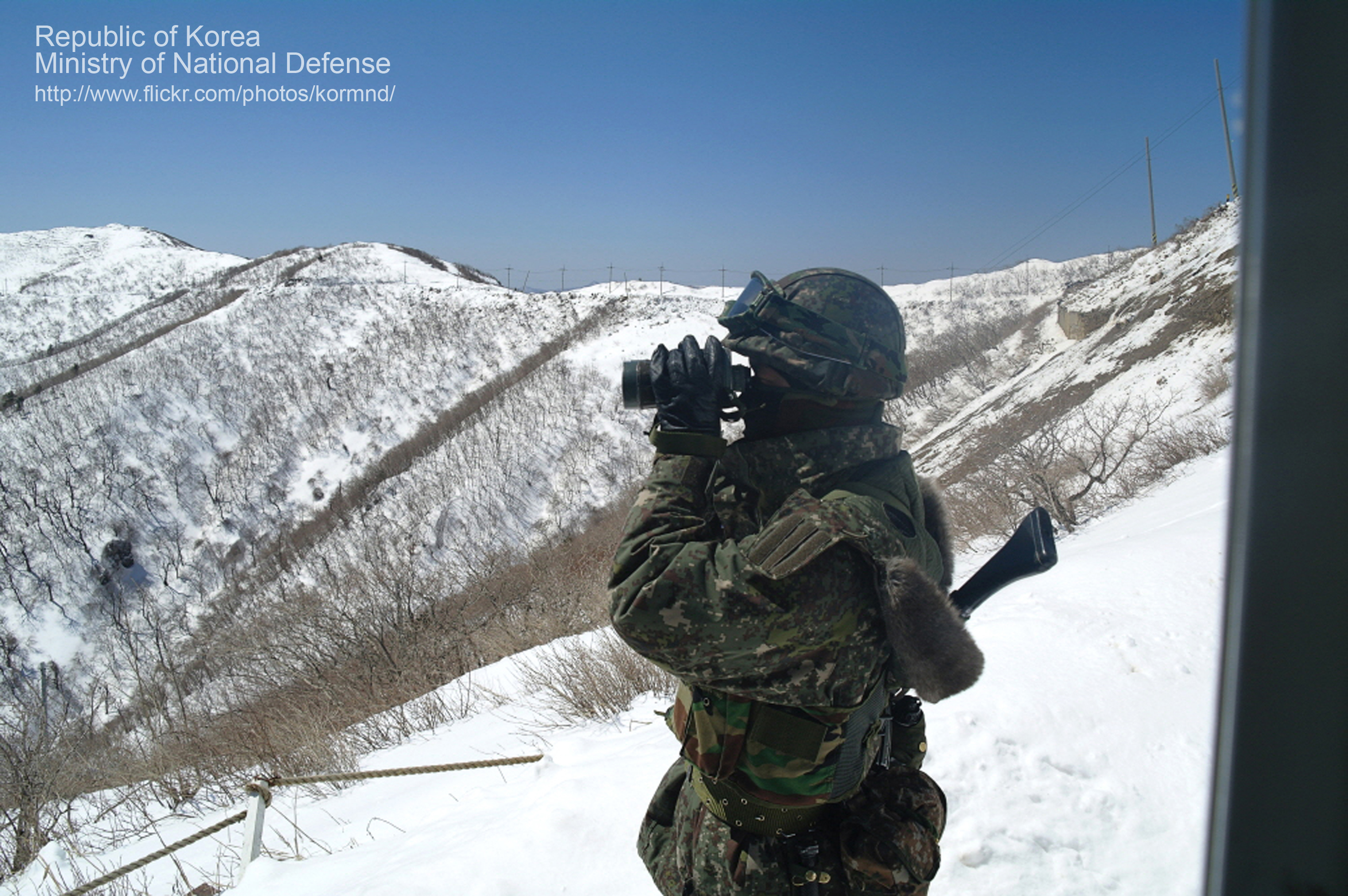 향로봉 산줄기를 쌍안경으로 훑어보며, 작은 움직임을 주시한다. 가끔은 하얀 눈밭을 뛰어 다니는 토끼, 고라니들이 밋밋한 쌍안경 속에 즐거움을 만든다. 4월 10일 보초(경계 근무)를 서며 일병 김민재